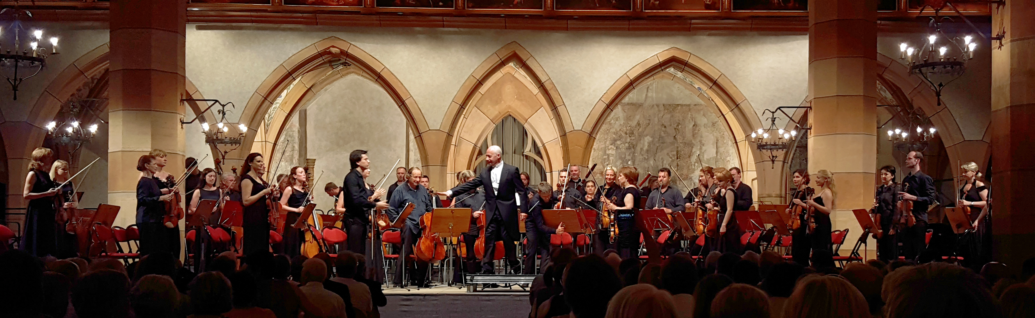 Vladimir Spivakov devant son public Colmarien à la tête de l'Orchestre National Philharmonique de Russie.